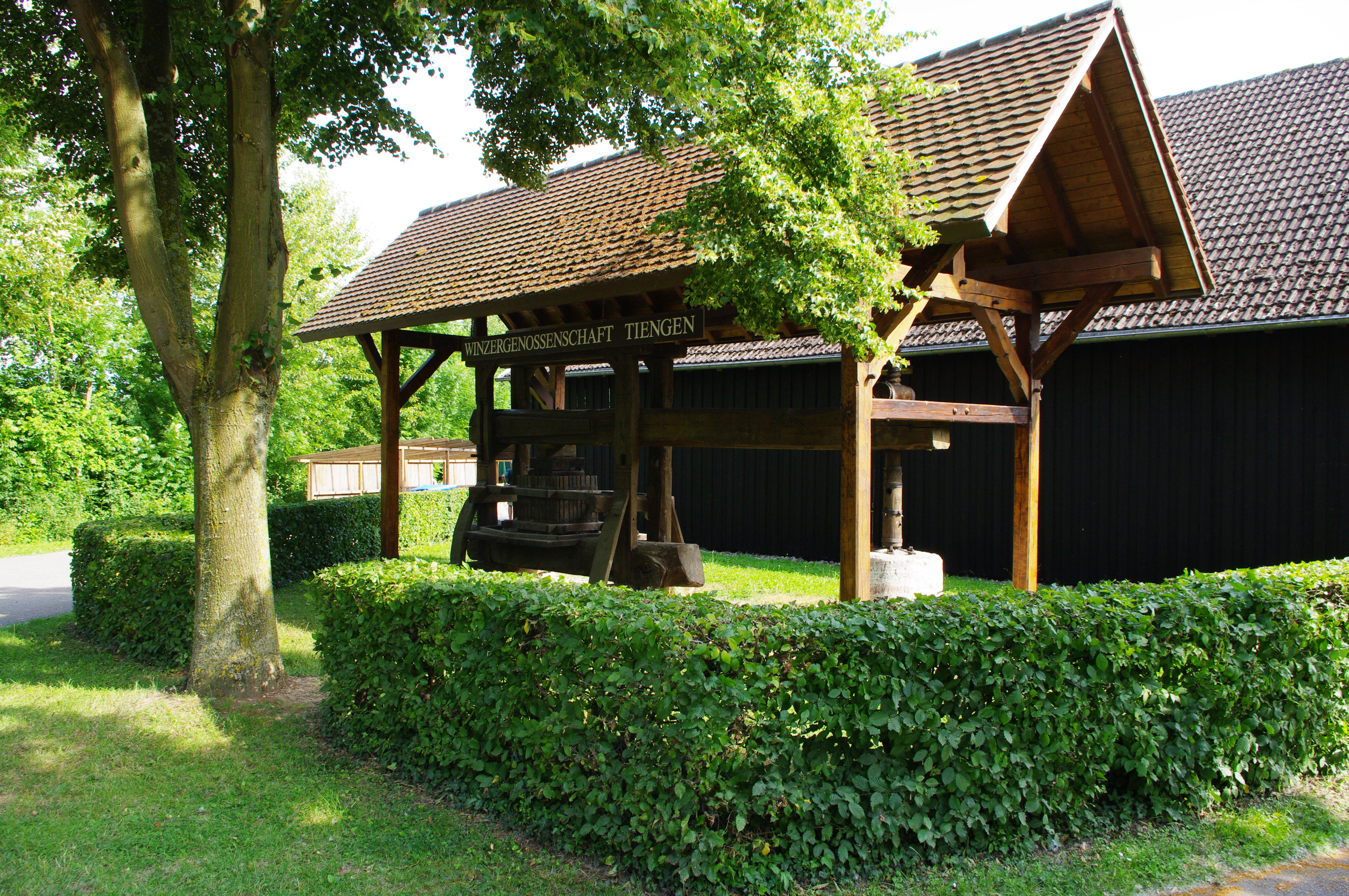 Historische Weinkelter